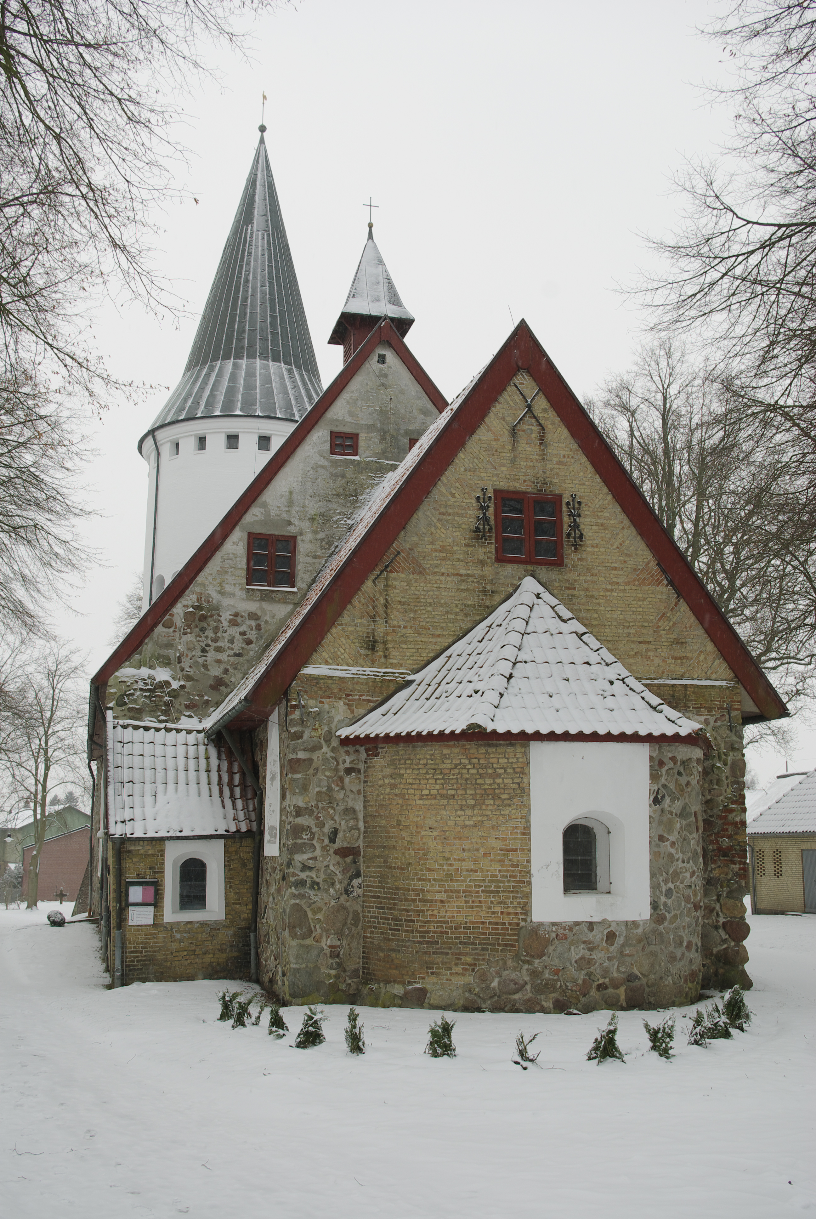 Kulturdenkmale in Süderstapel Nummer 1 Zähler 1